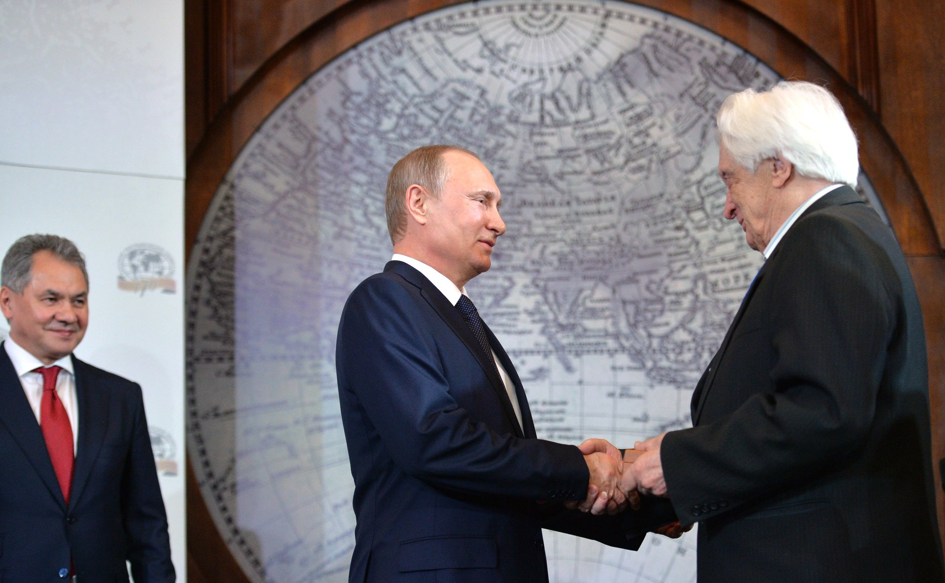 Заседание попечительского совета Русского географического общества. Владимир Путин вручает заслуженному деятелю науки, автору работ по геоморфологии Юрию Симонову высшую награду Российского географического общества — Константиновскую медаль